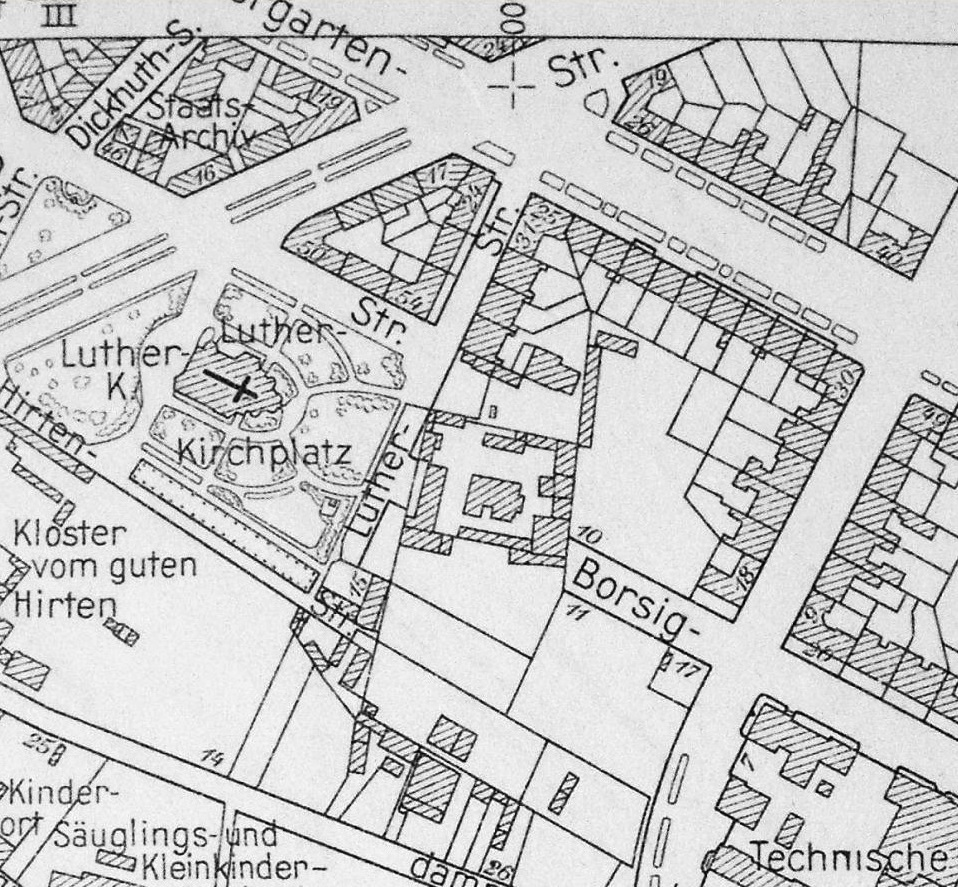 Grundriss der Lutherkirche in Breslau, Ausschnitt aus Stadtplan von 1932